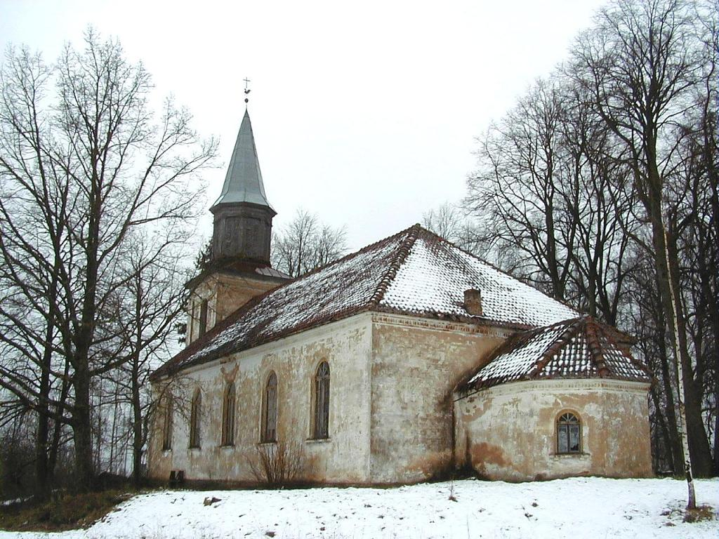 Dzirciema luterāņu baznīca 2001-04-21